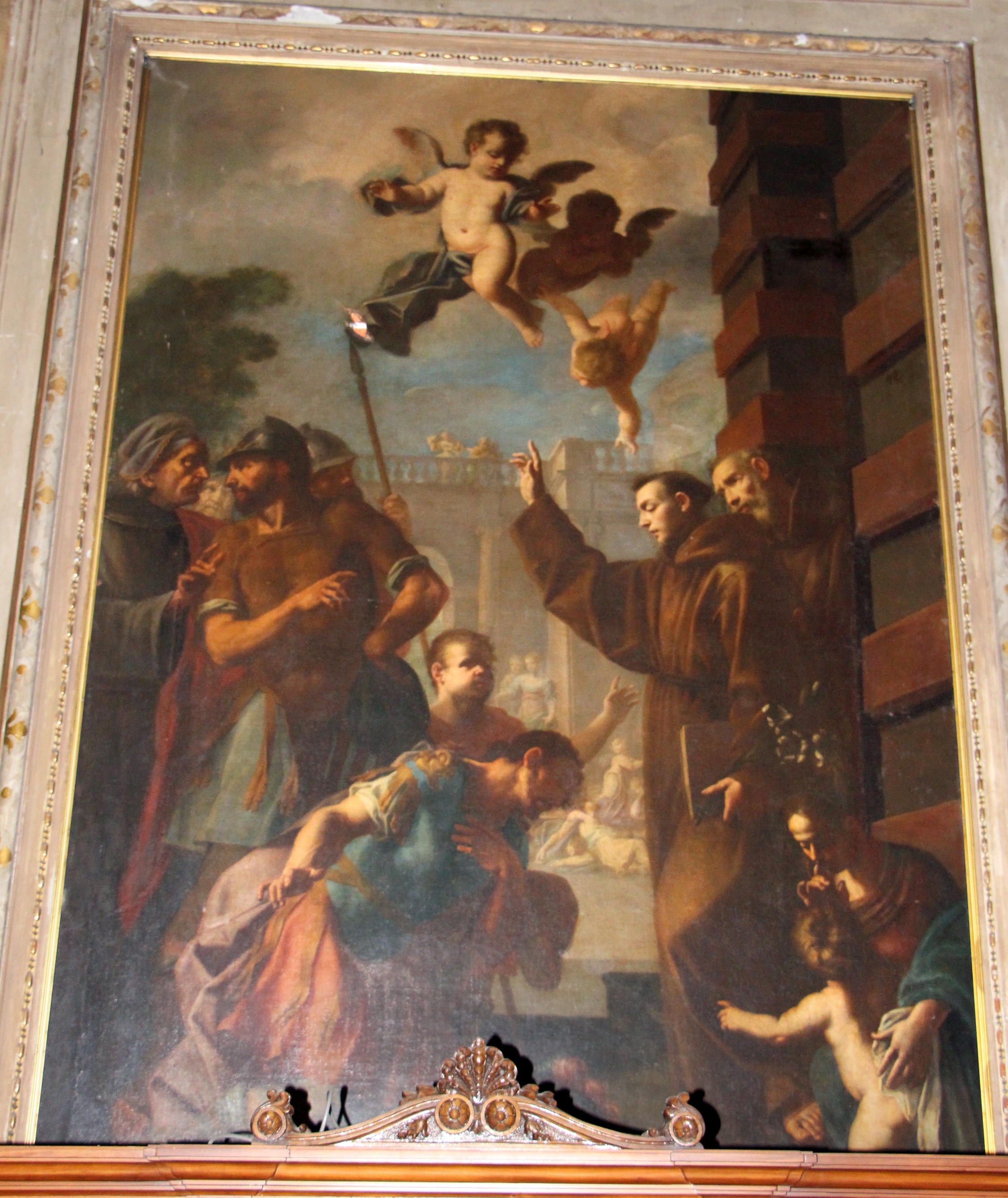 Giuseppe palmieri, Predica di sant'Antonio a Ezzelino da Romano, 1690-1710 ca..JPG